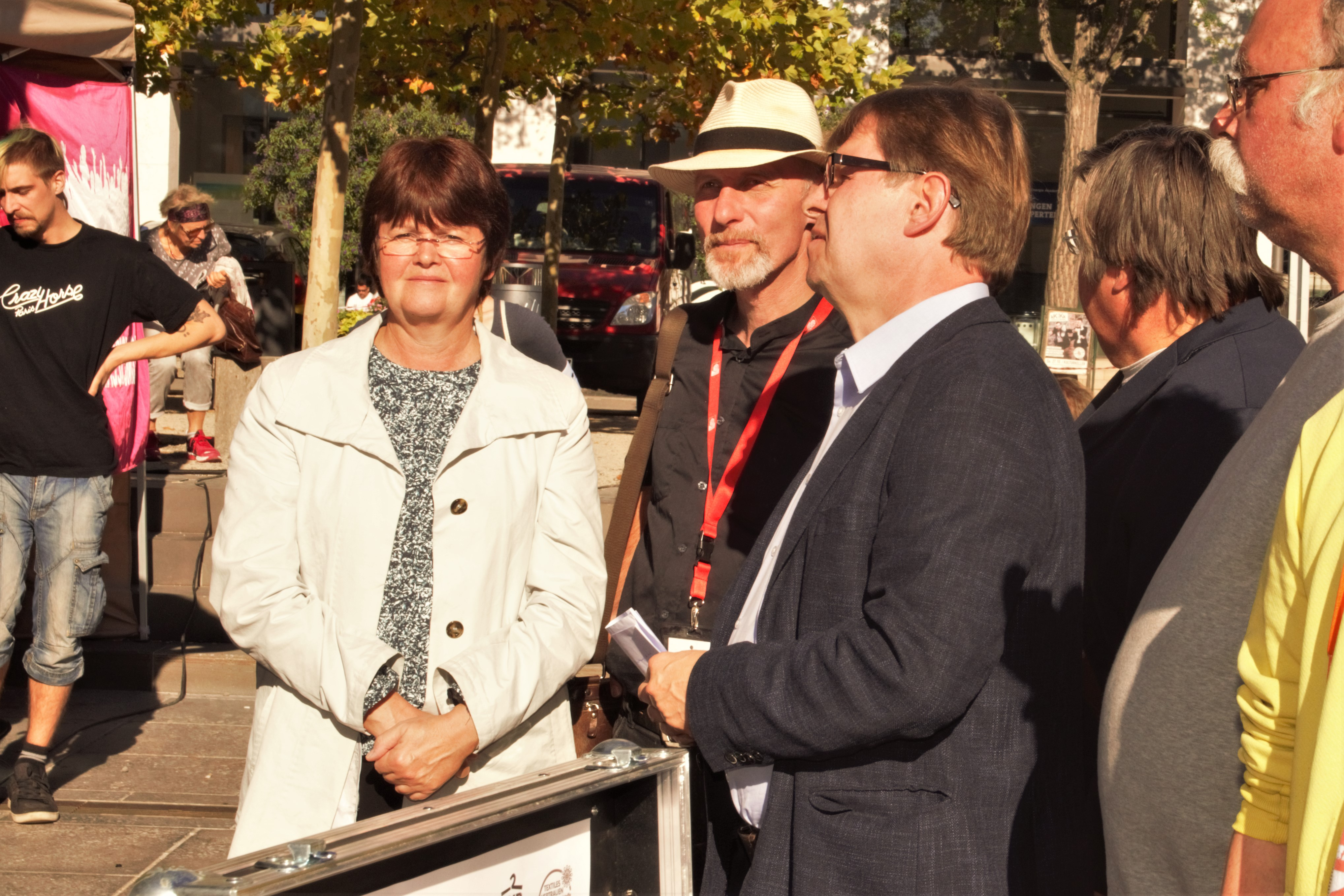 Ralf Stegner und Sabine Waschke (beide SPD)